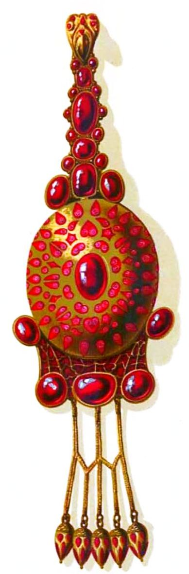 Reconstituire a fibulei mijlocii făcută de Alexandru Odobescu, adică, cum arăta ea nedeteriorată